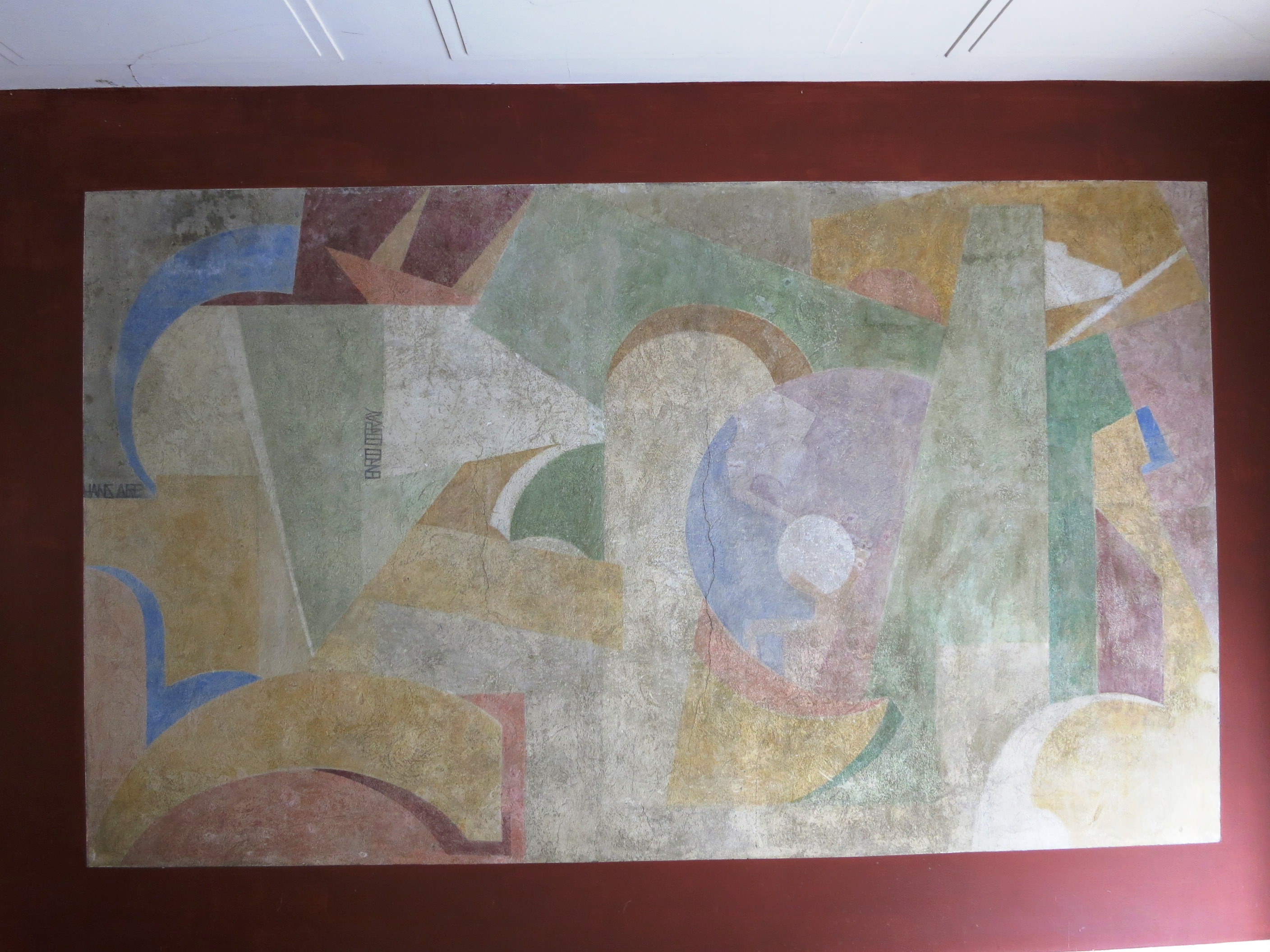 Wandmalerei von Hans Arp 1916, Zürich-Hottingen, Schweiz